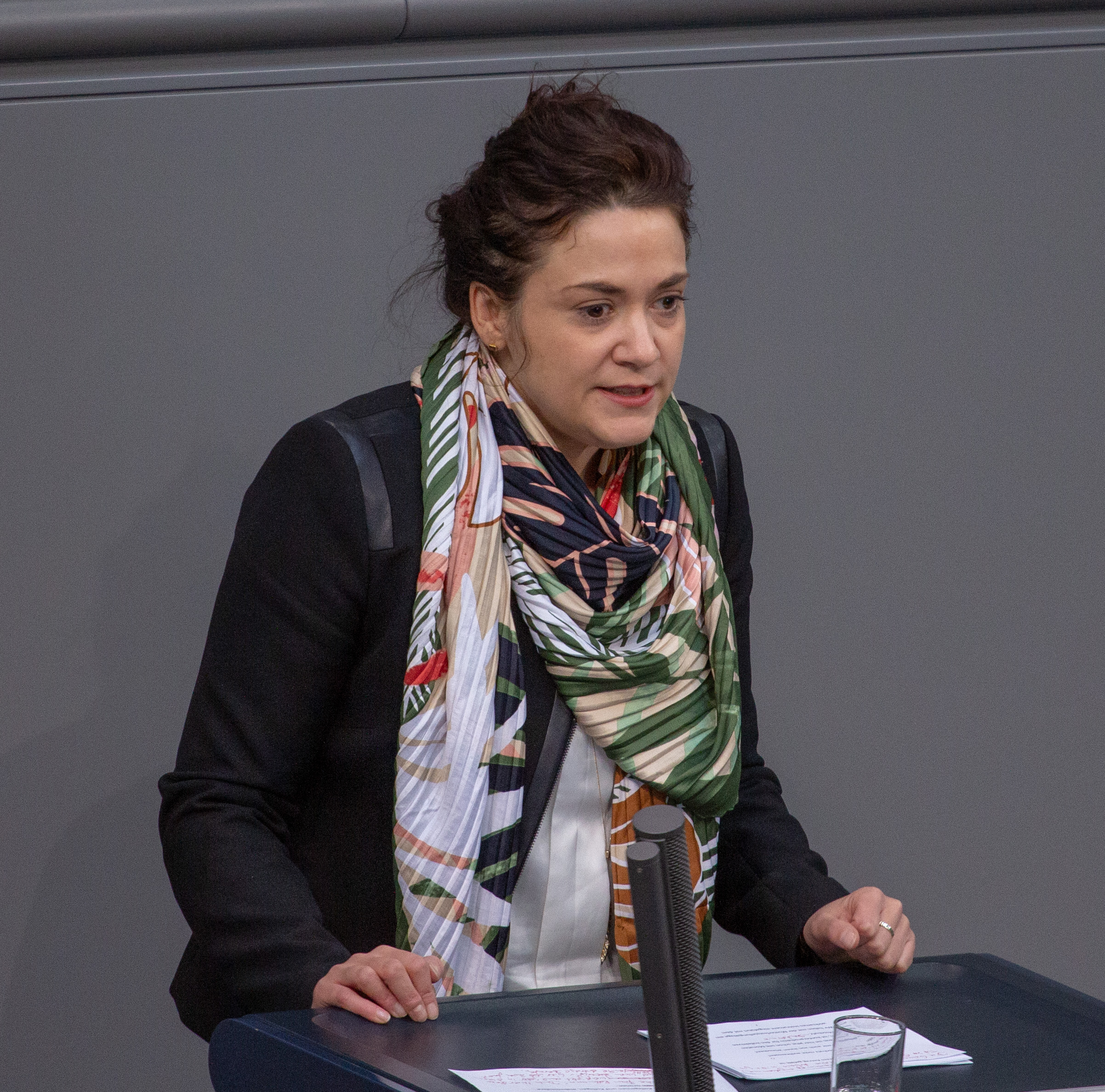 Sarah Ryglewski, Mitglied des Deutschen Bundestages, während einer Plenarsitzung am 12. April 2019 in Berlin.